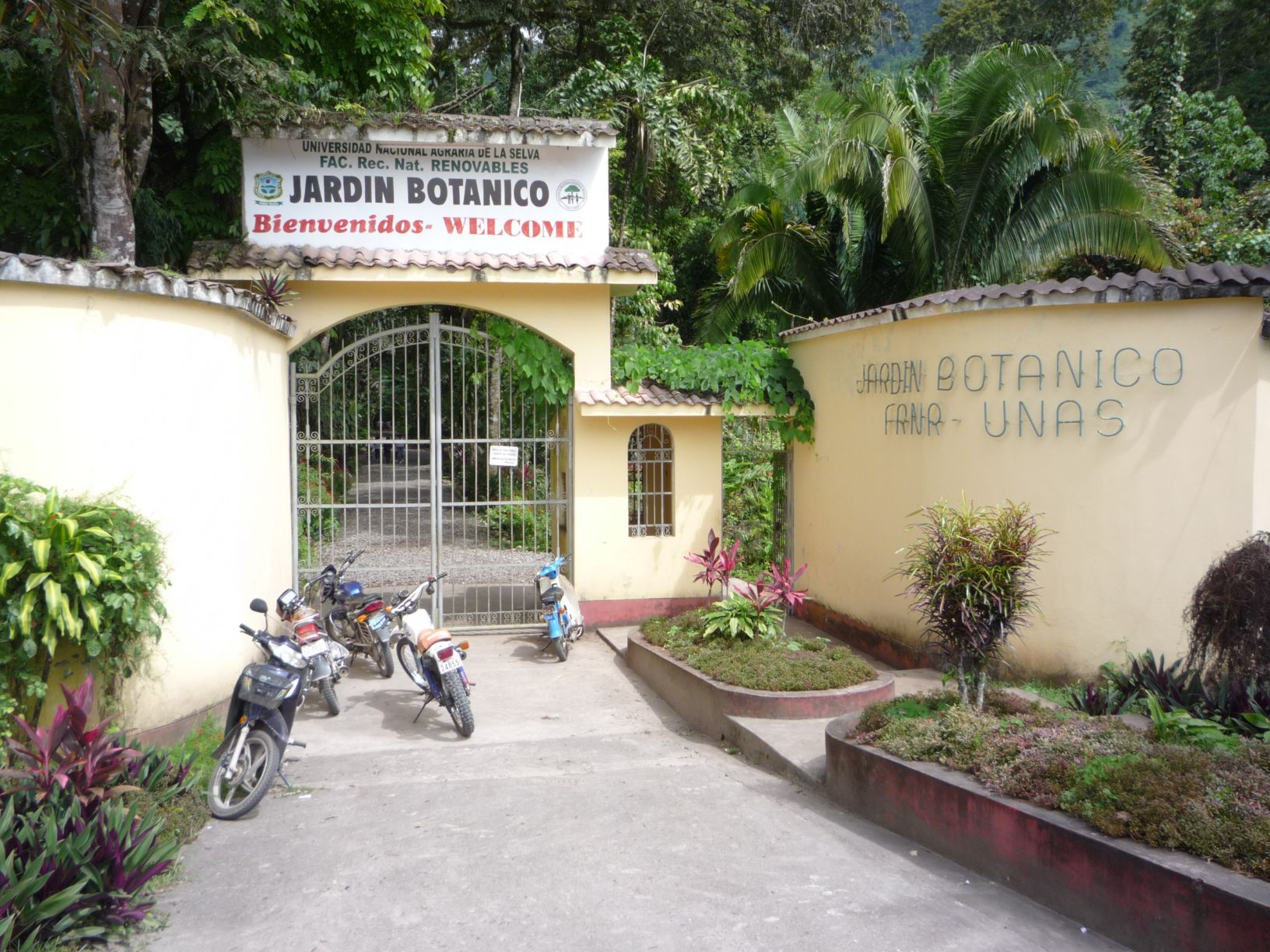 Jardin botanico UNAS